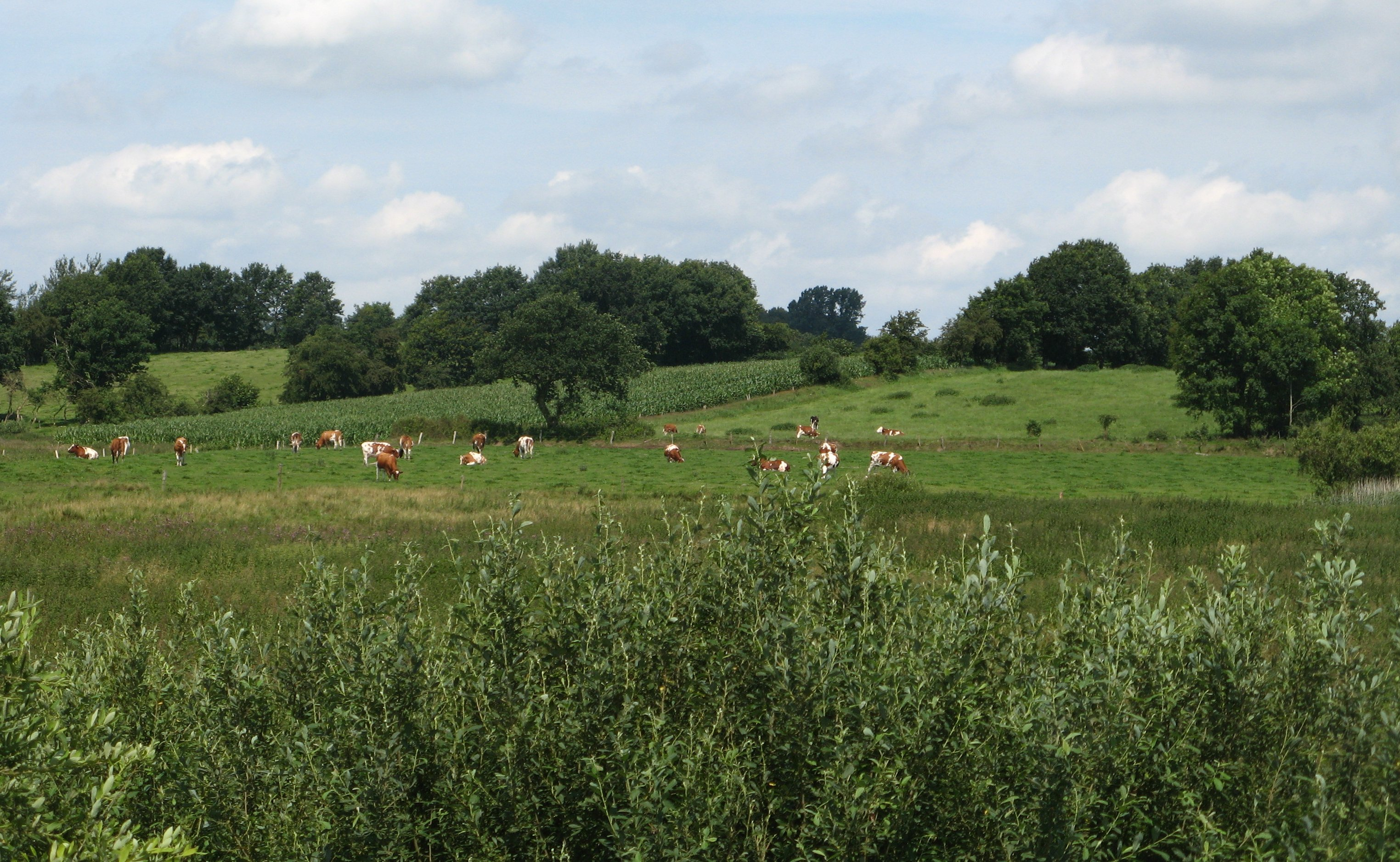 landscape (hohe geest) in Dörpling